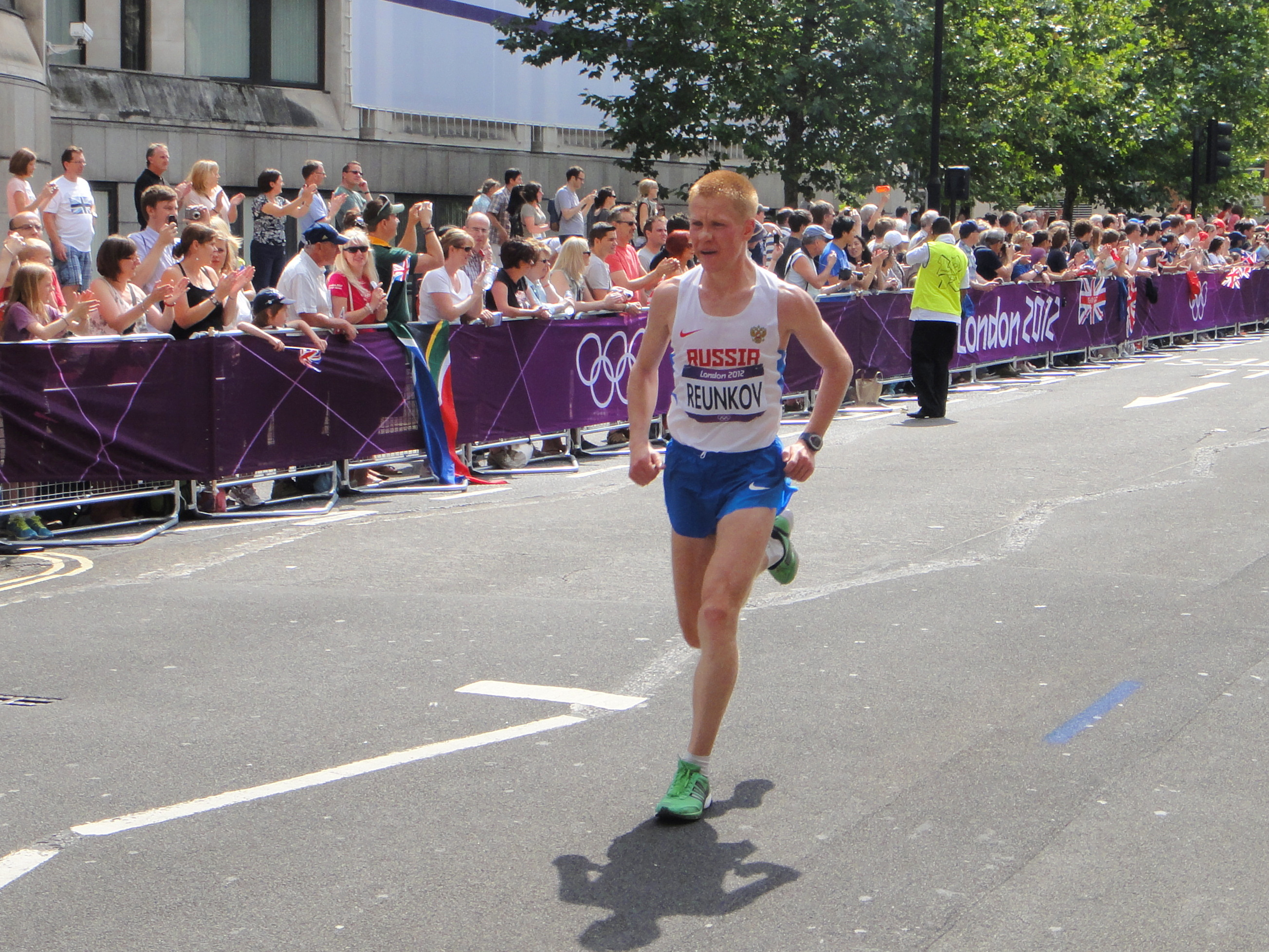 Aleksey Reunkov (Russia) - London 2012 Men's Marathon